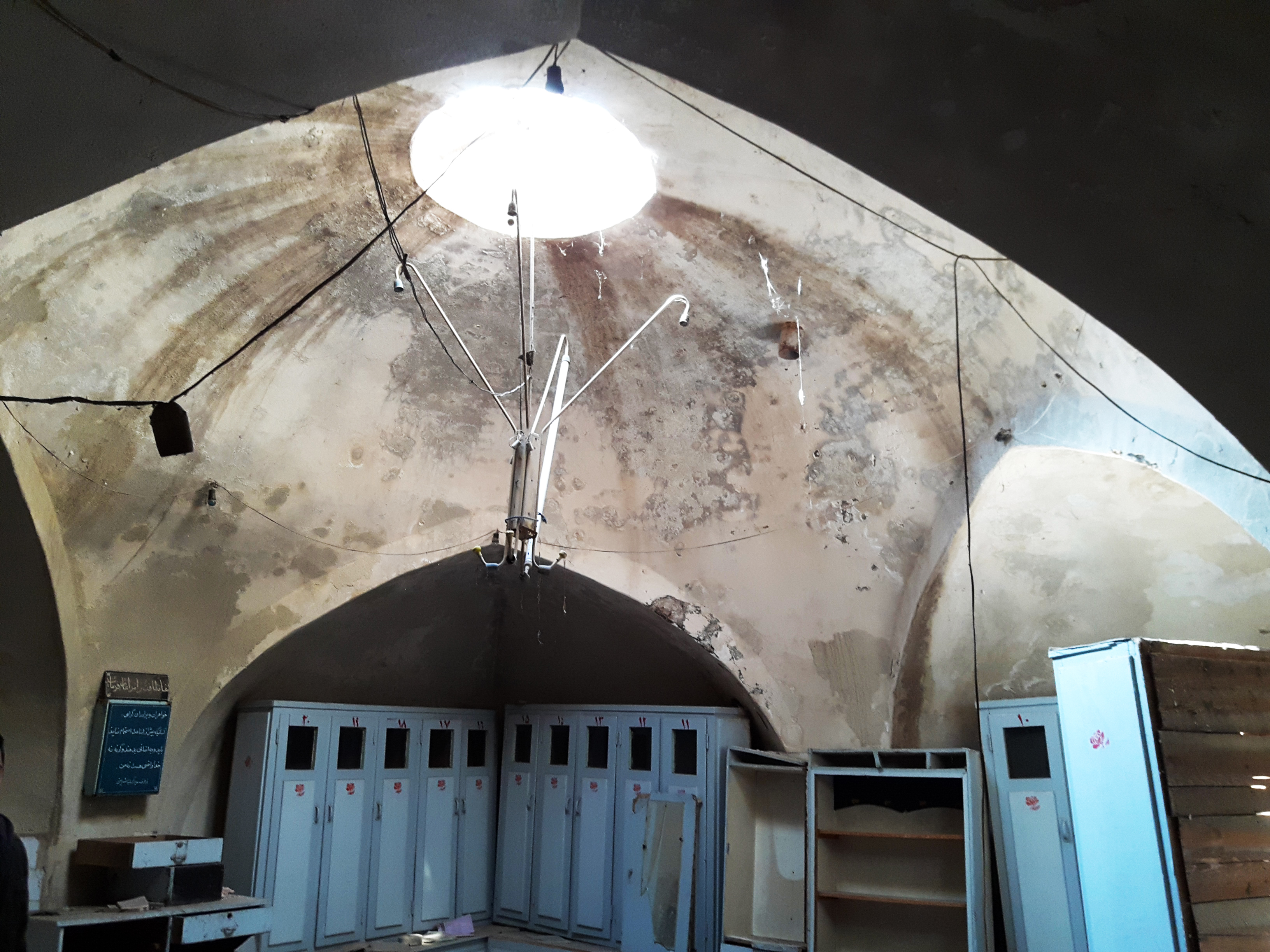 حمام تاریخی شنب غازان تبریز